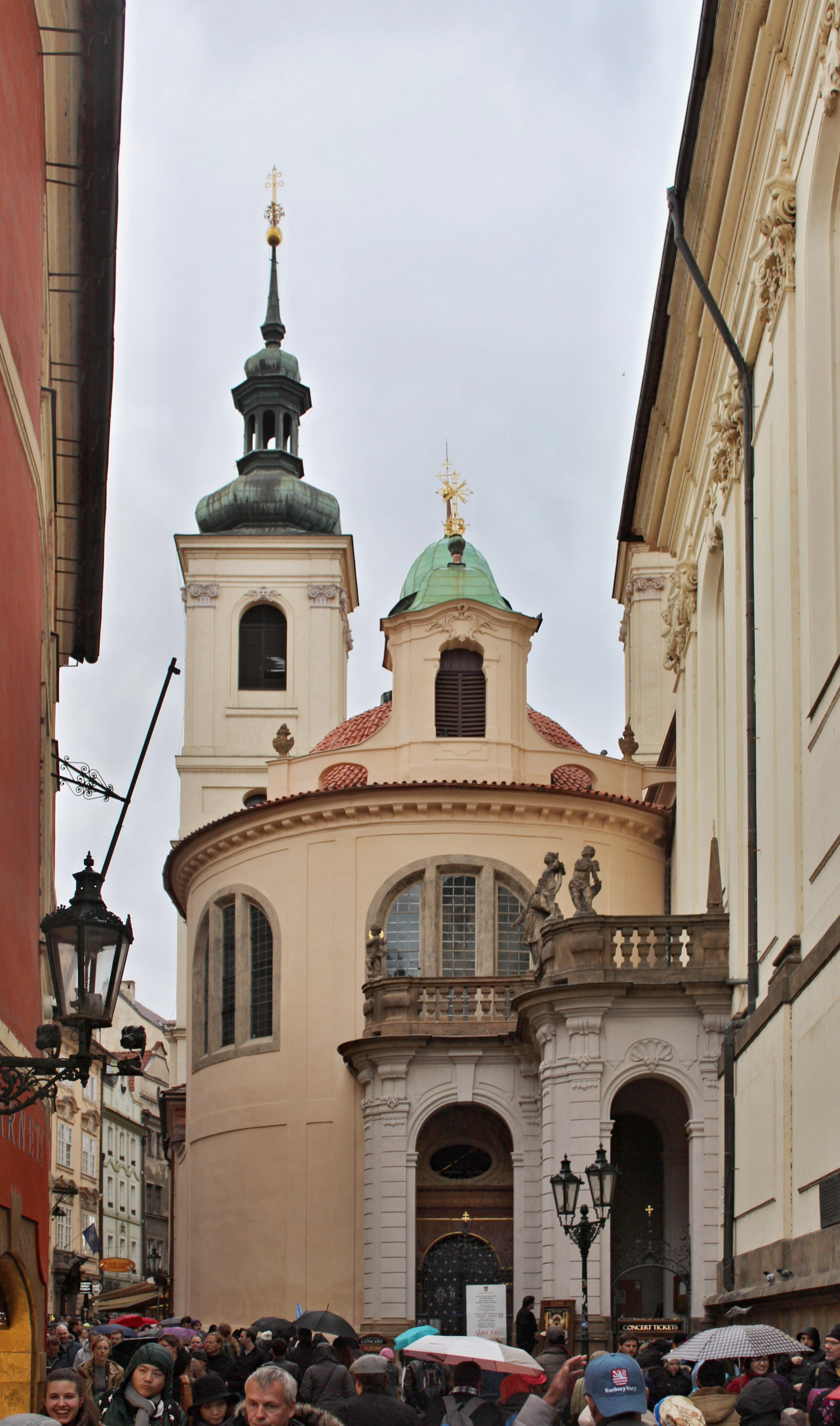 Vlašská kaple Klementina